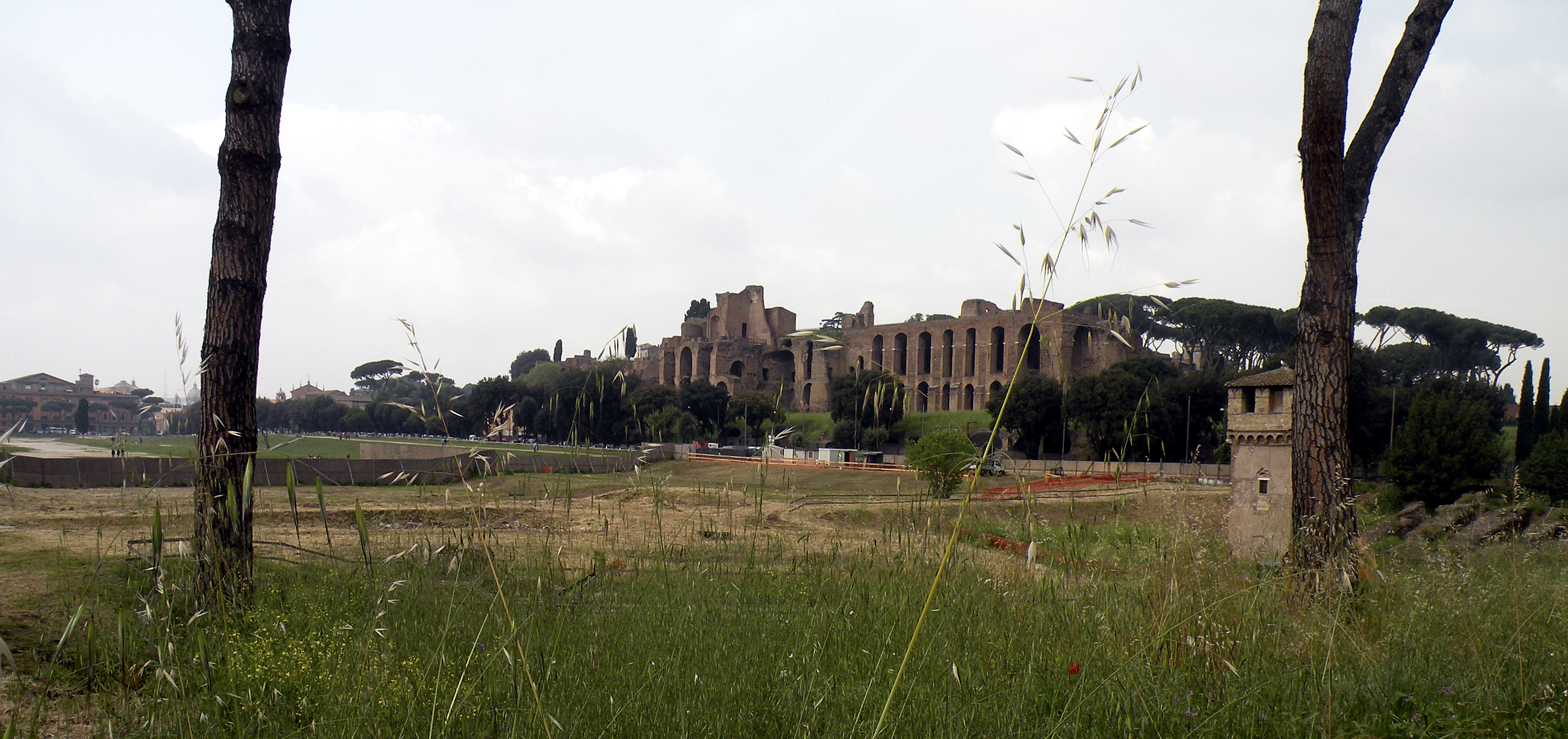 Палатин. Большой Цирк и термы Септимия Севера / Circus Maximus et Domus Septimii Severi Palatini